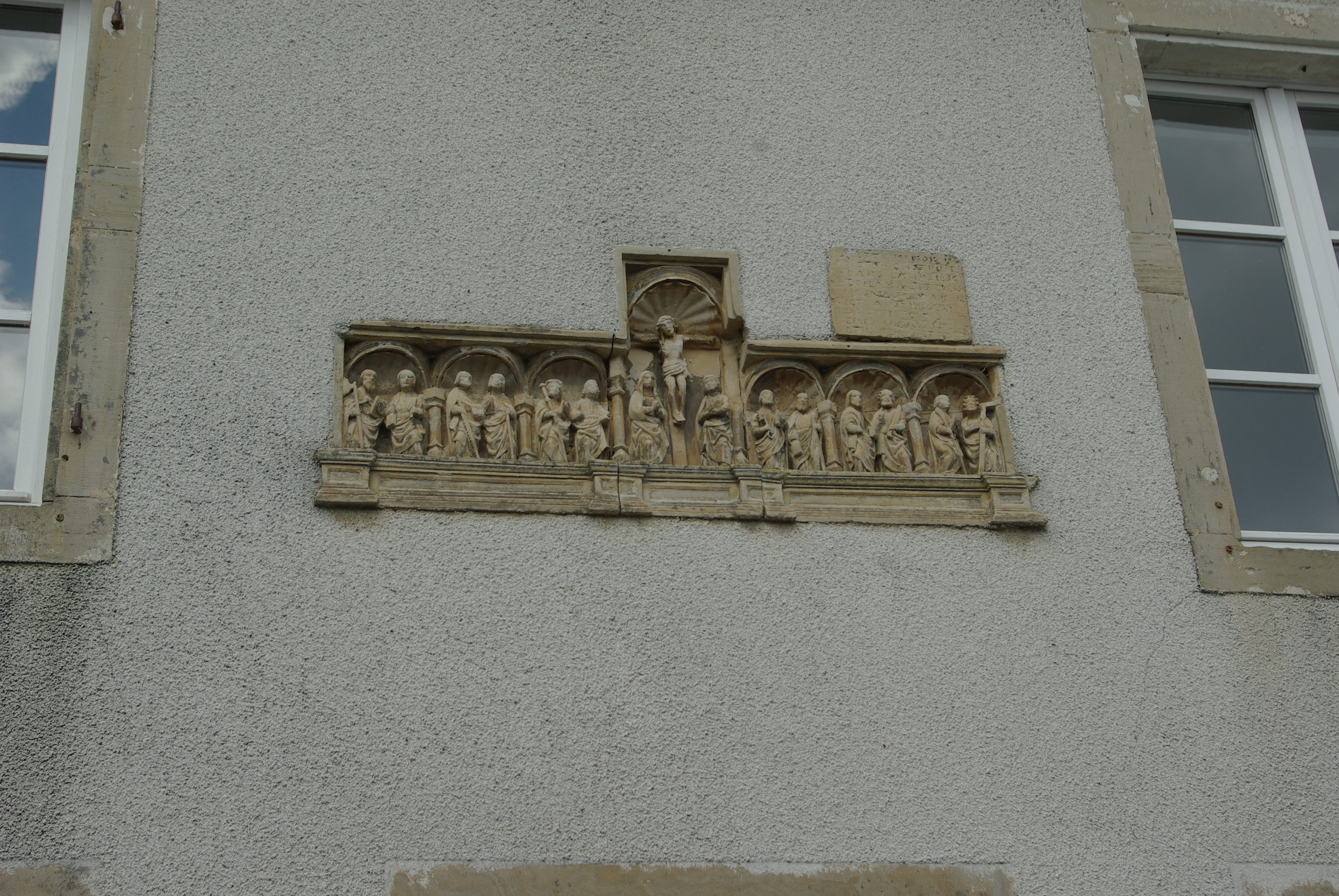 Cène sur la mairie de Repel (88)